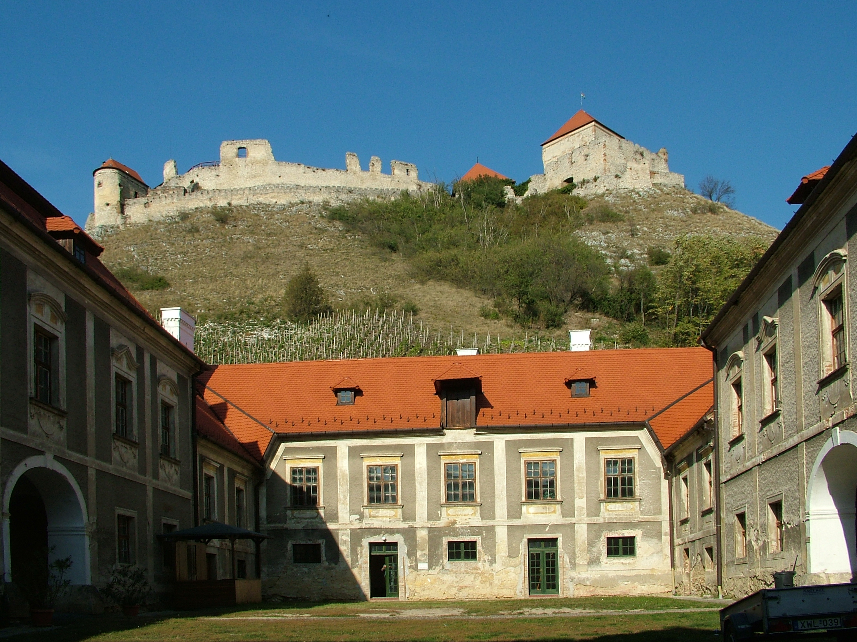 A sümegi püspöki palota, háttérben a várral